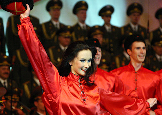 Академический ансамбль песни и пляски имени А.В. Александрова